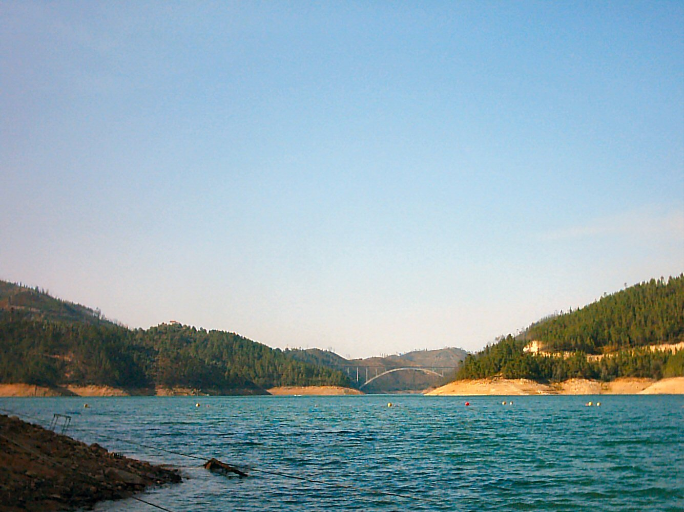 Lago Azul no Rio Zêzere, Portugal